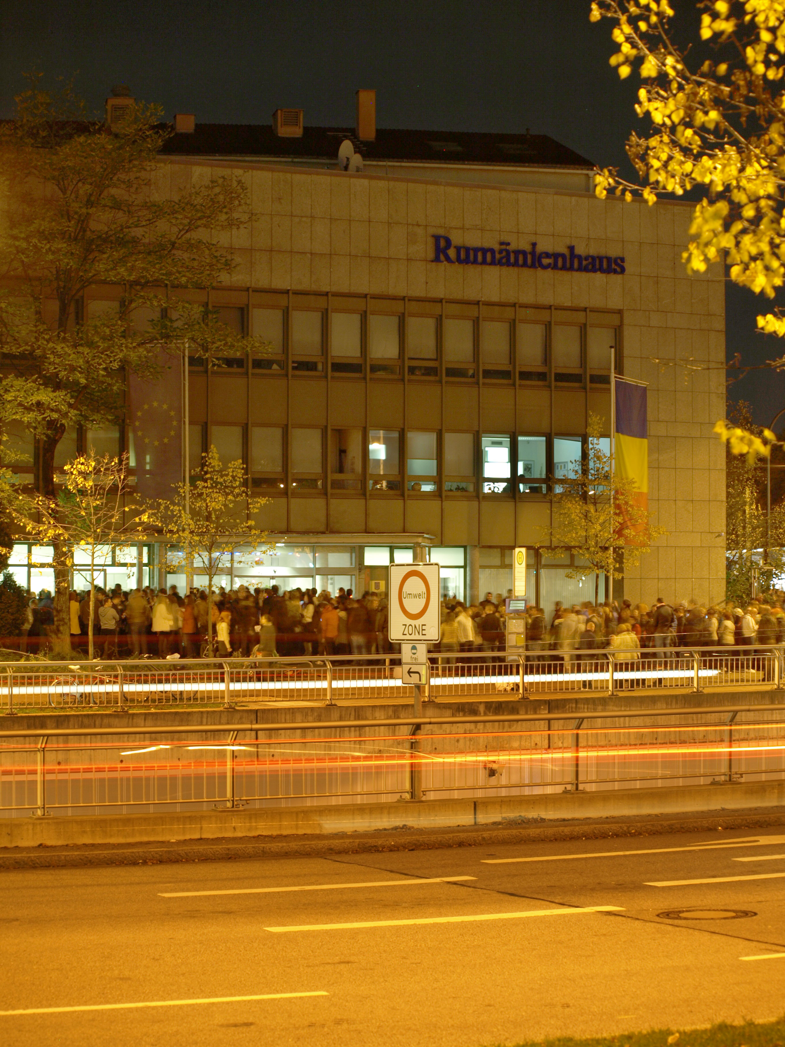 Vot și proteste la München 2 noiembrie 2014